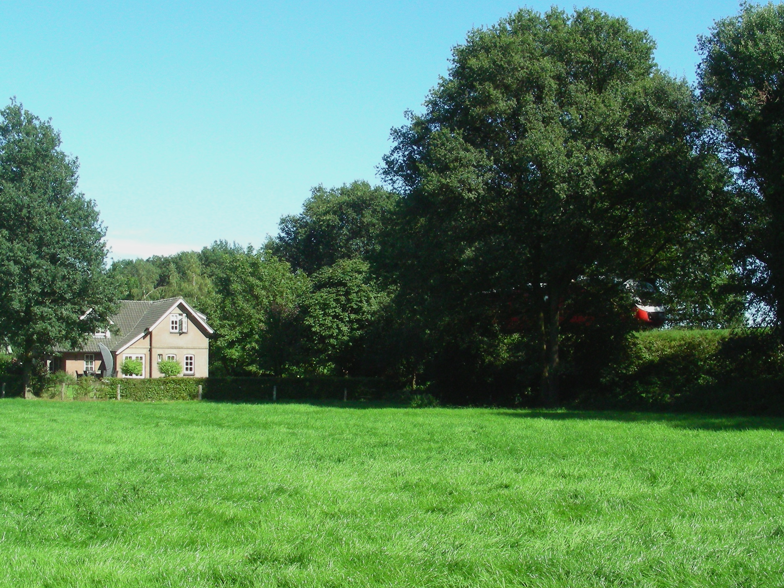 Baanwachtershuis 27 bij de voormalige stopplaats Wiene. Bij km 34.6 aan de spoorlijn Zutphen - Glanerbeek. Op de achtergrond is het talud naar de brug over de zijtak naar Almelo van het Twentekanaal te zien, met rechts een Syntus LINT naar Goor. Op de website van de Nederlandse Vereniging van Belangstellenden in het Spoor- en tramwegwezen is een afbeelding uit 1960 (negatief NEG101093-090-37) van dezelfde woning te vinden.